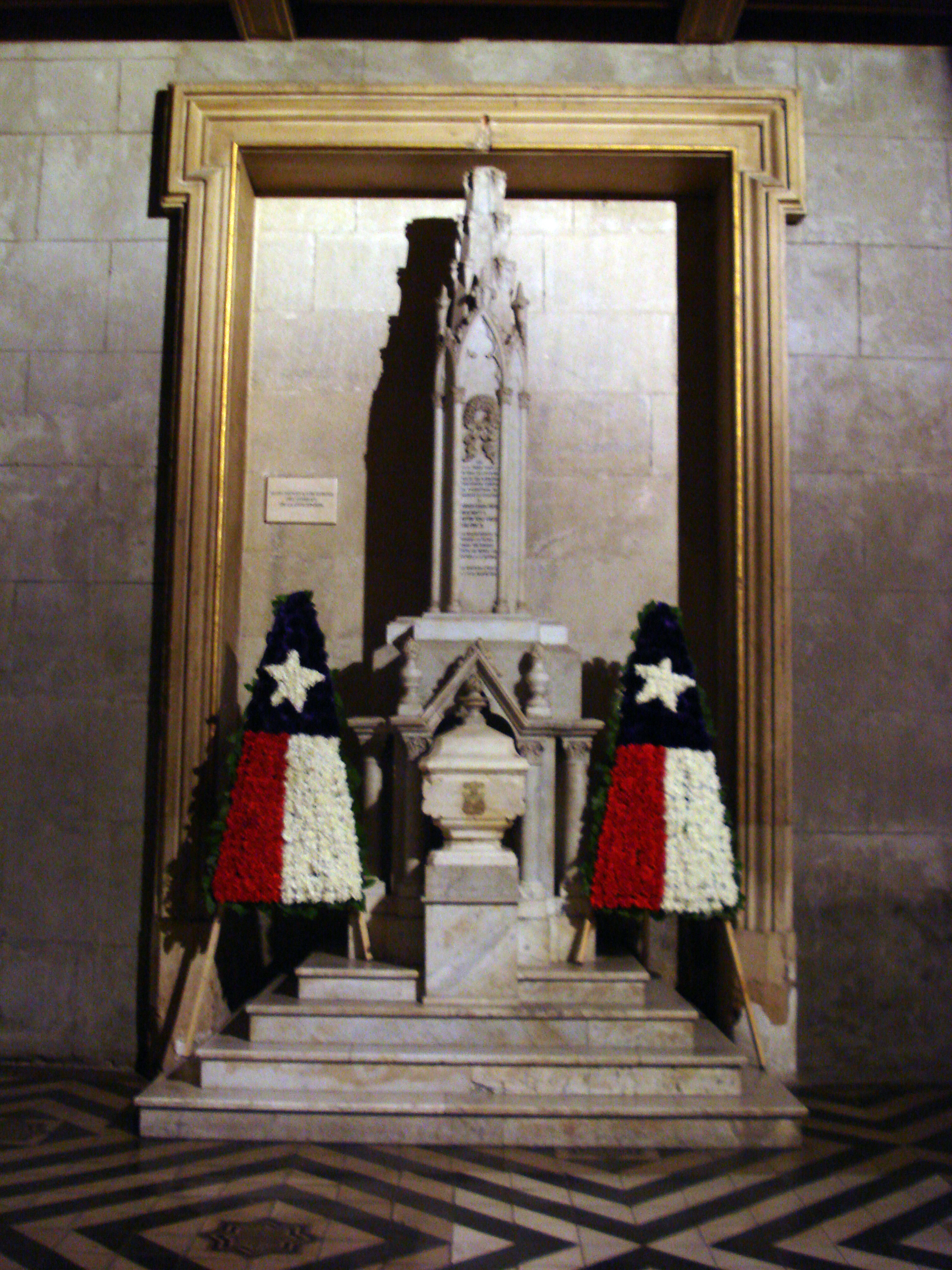 Monumento a los Héroes del Combate de La Concepción en la catedral de Santiago de Chile. Guarda los los corazones de Ignacio Carrera Pinto, Julio Montt Salamanca, Arturo Pérez Canto y Luis Cruz Martínez que sin rendirse, dieron su vida por Chile en dicha Batalla, el 9 y 20 de julio de 1882.